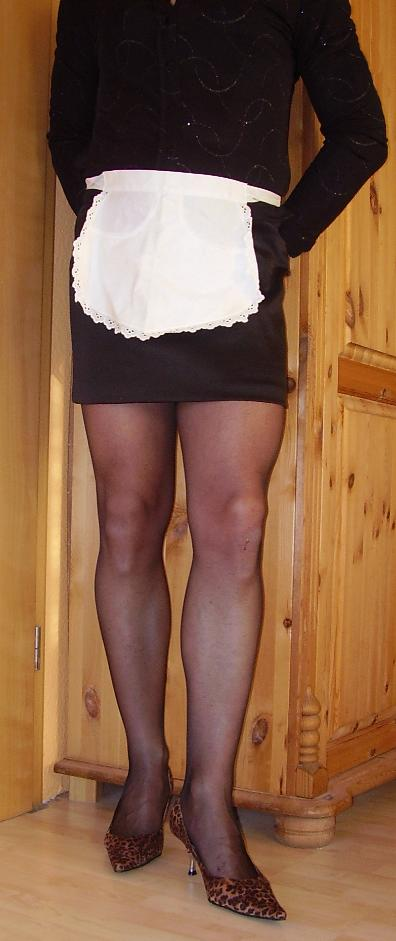 waitress wearing miniskirt.